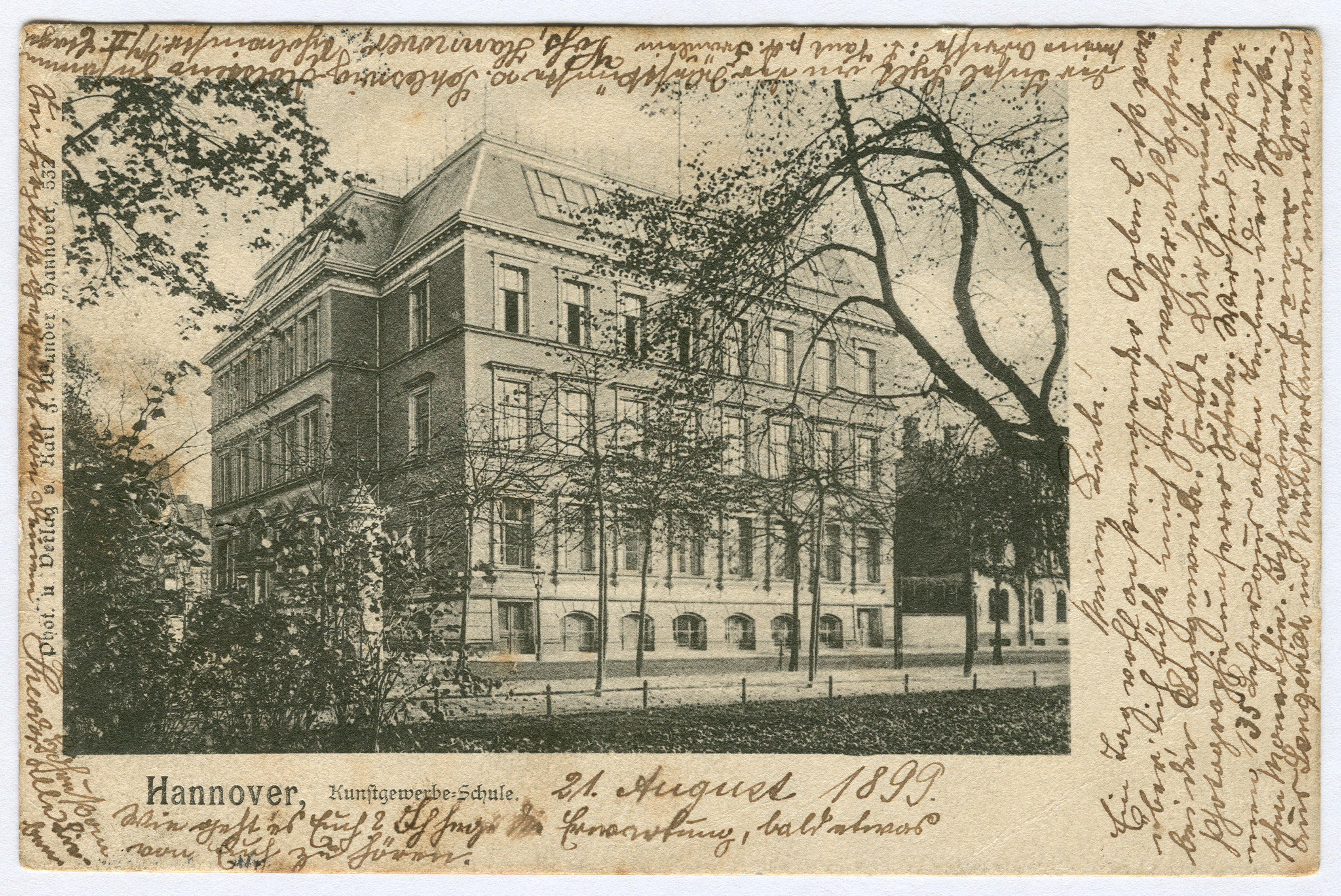 Die alte Kunstgewerbeschule